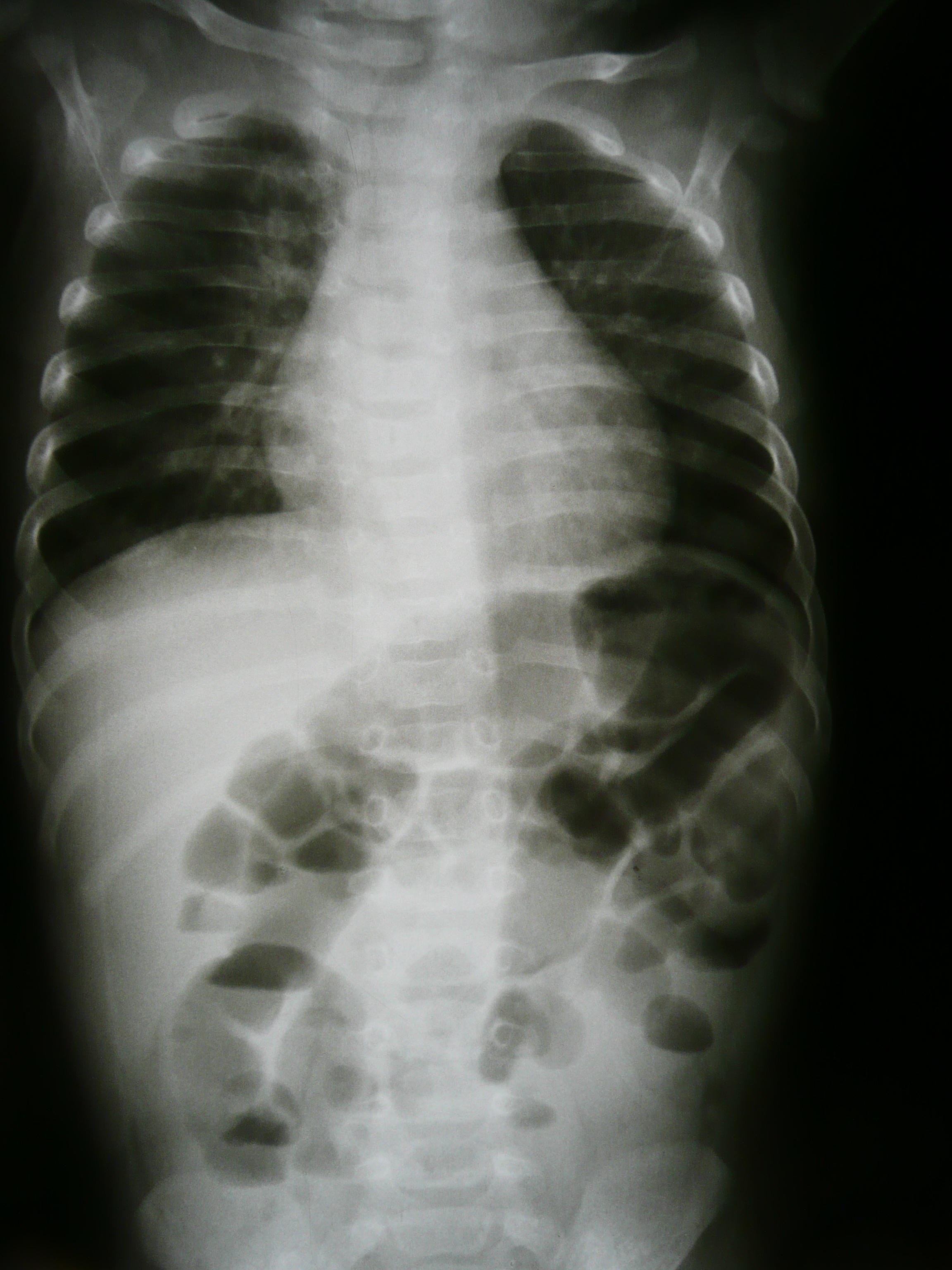 Medical X-rays